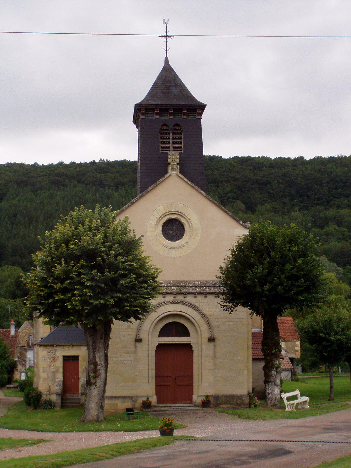 Eglise de Nannay (Nièvre)